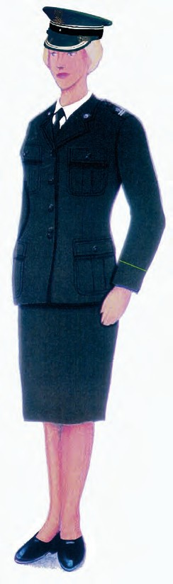 Ubiór wyjściowy funkcjonariuszy noszących umundurowanie SP z mundurem wyjściowym noszonym ze spódnicą z czapką garnizonową.